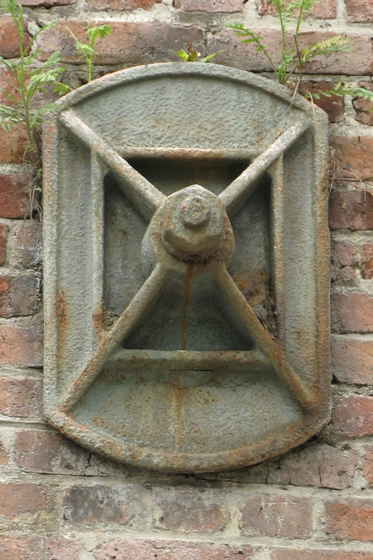 Maueranker vum Stroossentunnel ënner dem Plan incliné zu Ans.